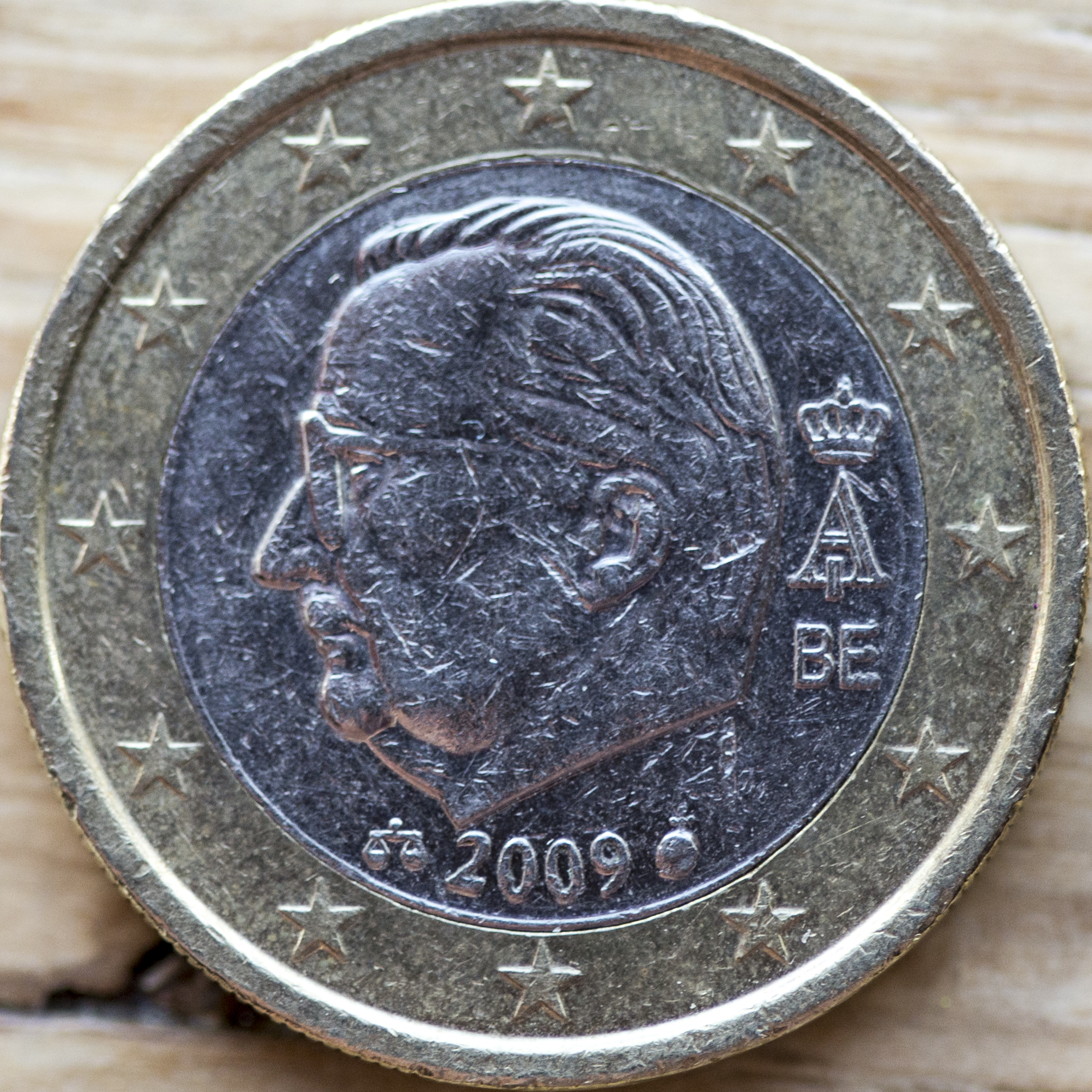 Euro 2009 Belgium